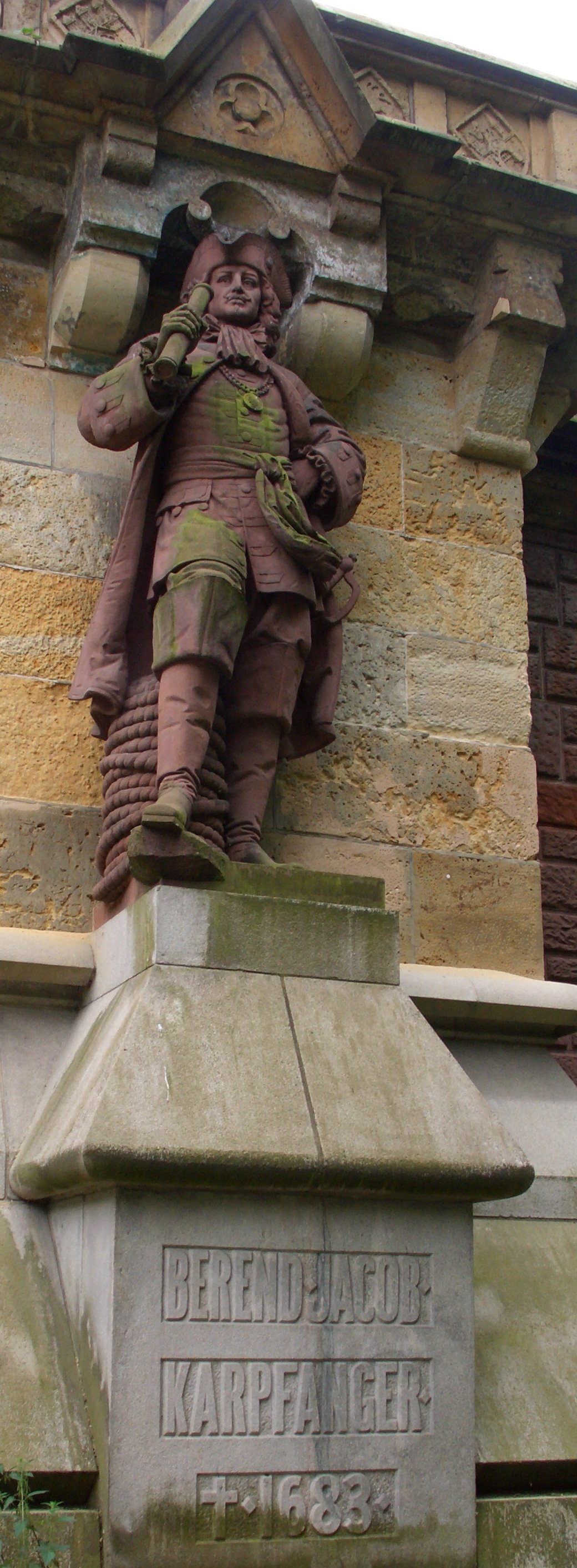 Berend Jacob Karpfanger am Sockel der Kersten-Miles-Brücke in Hamburg (Landungsbrücken).